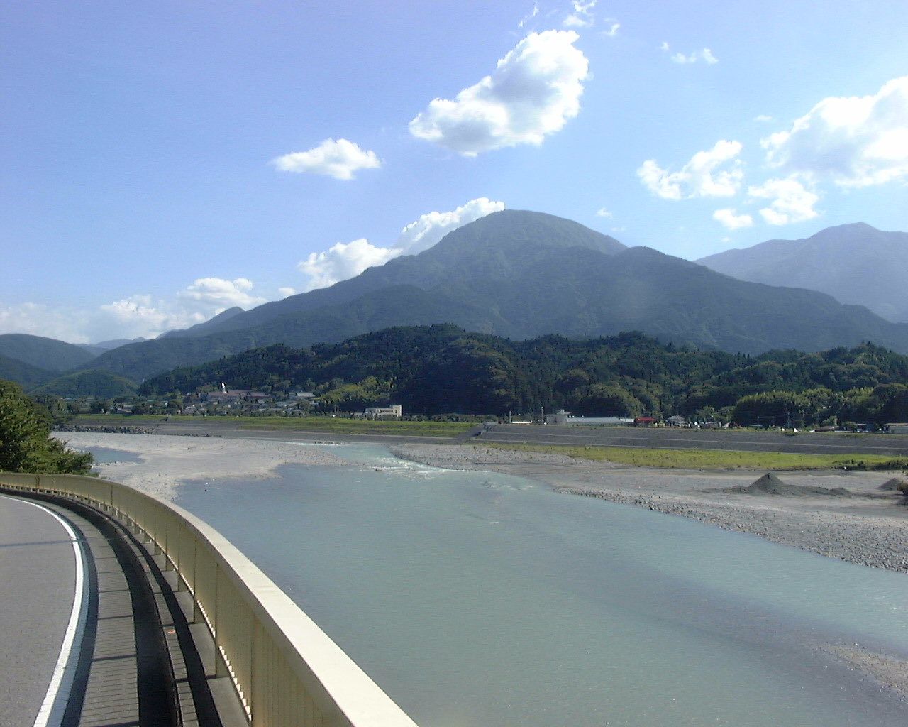 篠井山を望む